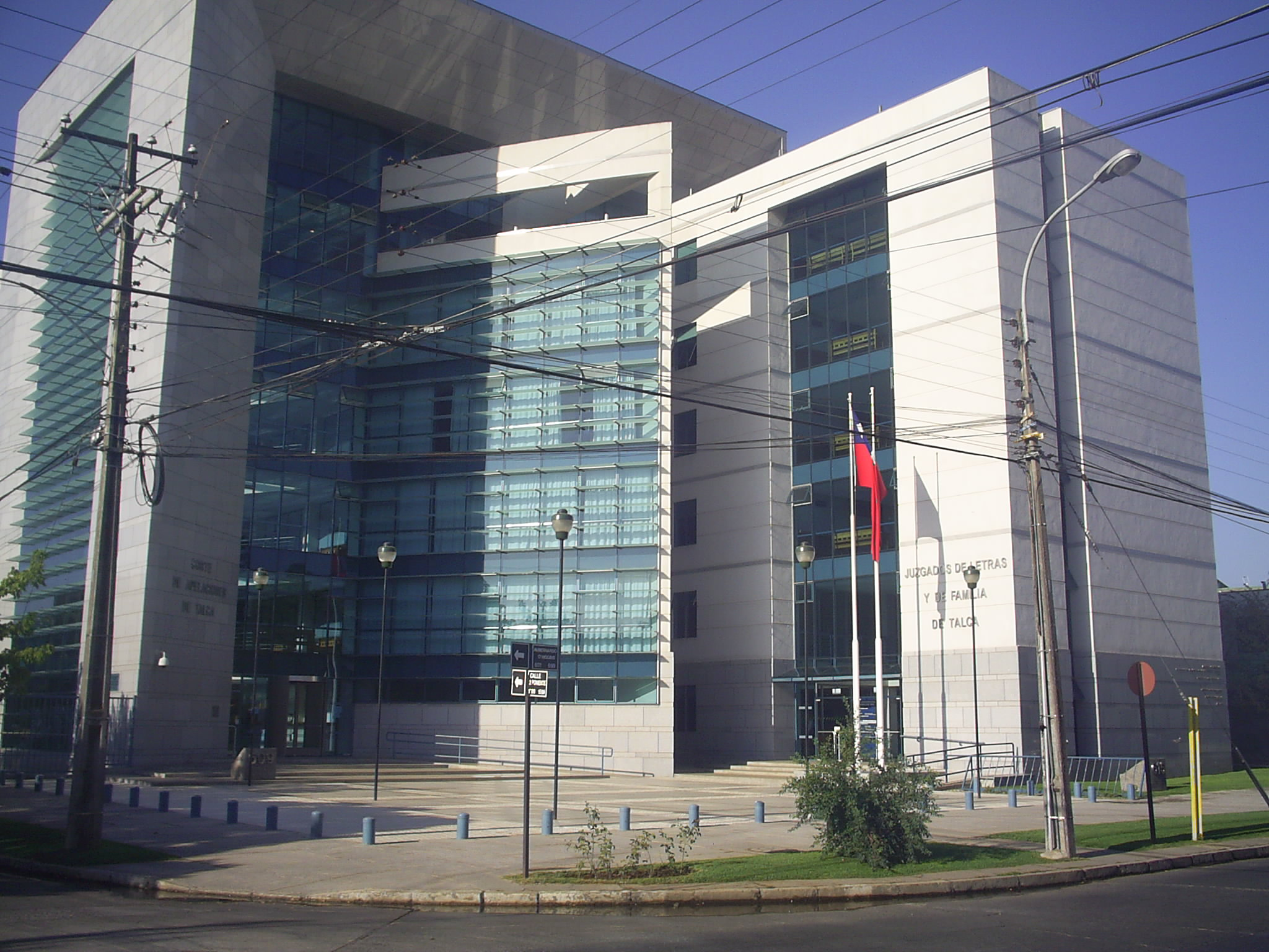 Nuevo edificio de la Corte de Apelaciones y Juzgado de Letras y de Familia. Ubicado en 1 Poniente con Avenida Bernardo O'Higgins. Fotografía tomada el 15 de febrero del 2006.